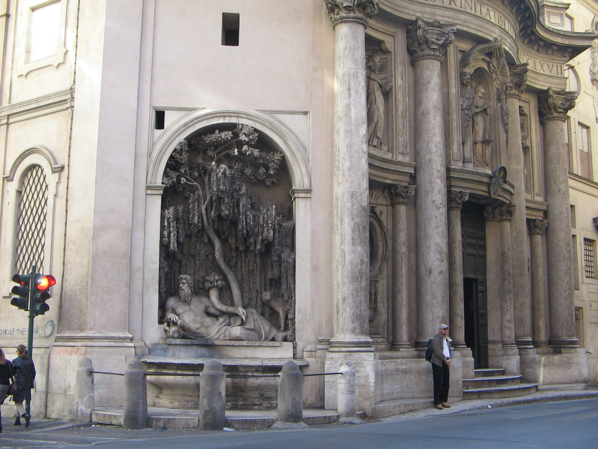 una delle "Quattro Fontane": il fiume Tevere. A destra si vede la lupa.